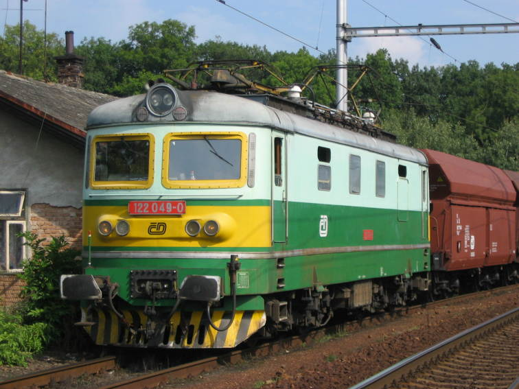 Lokomotiva řady 122, oblast stanice Převýšov